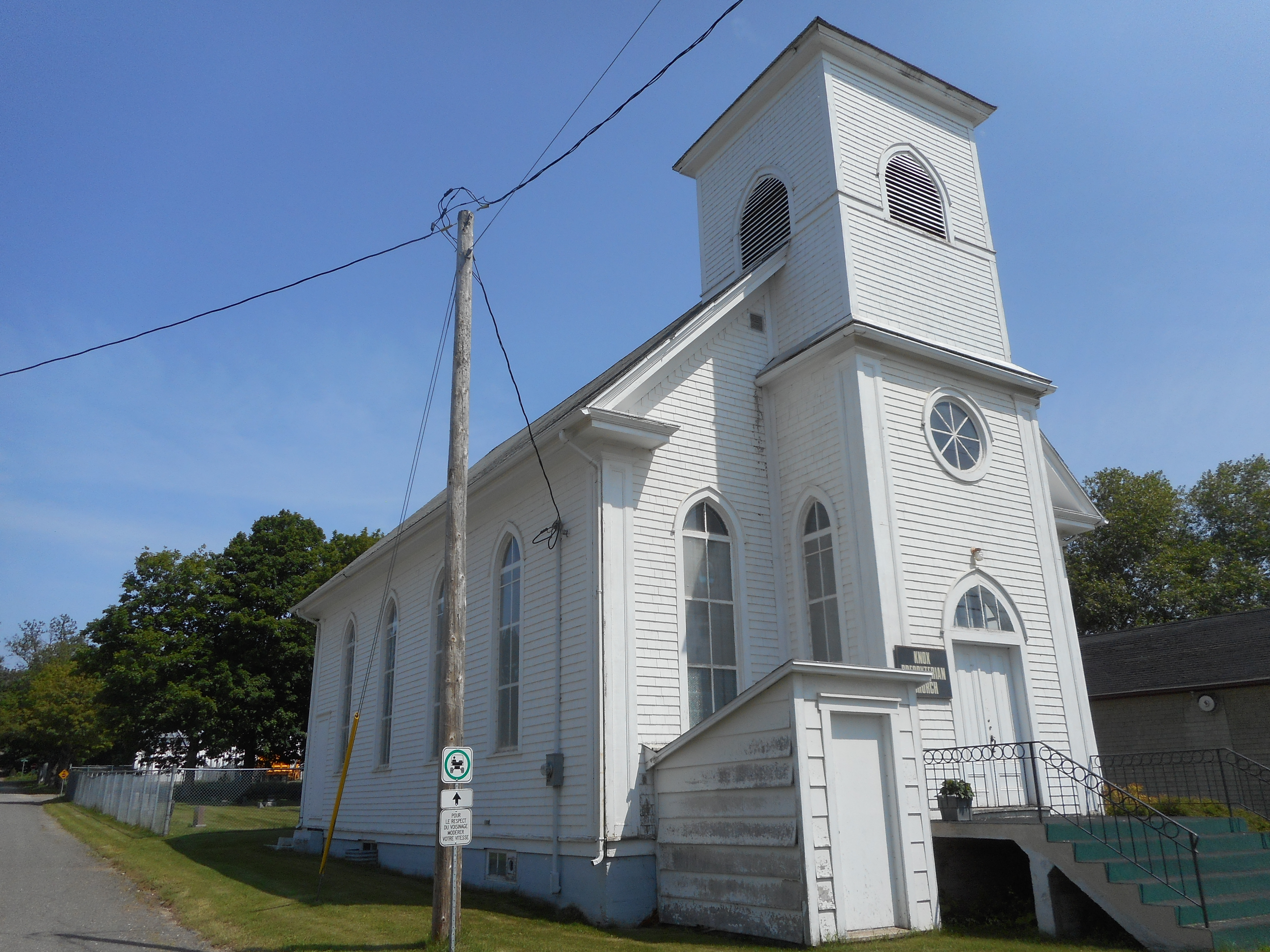 Église Knox Presbyterian, boulevard Gérard-D.-Levesque, New Carlisle, Québec